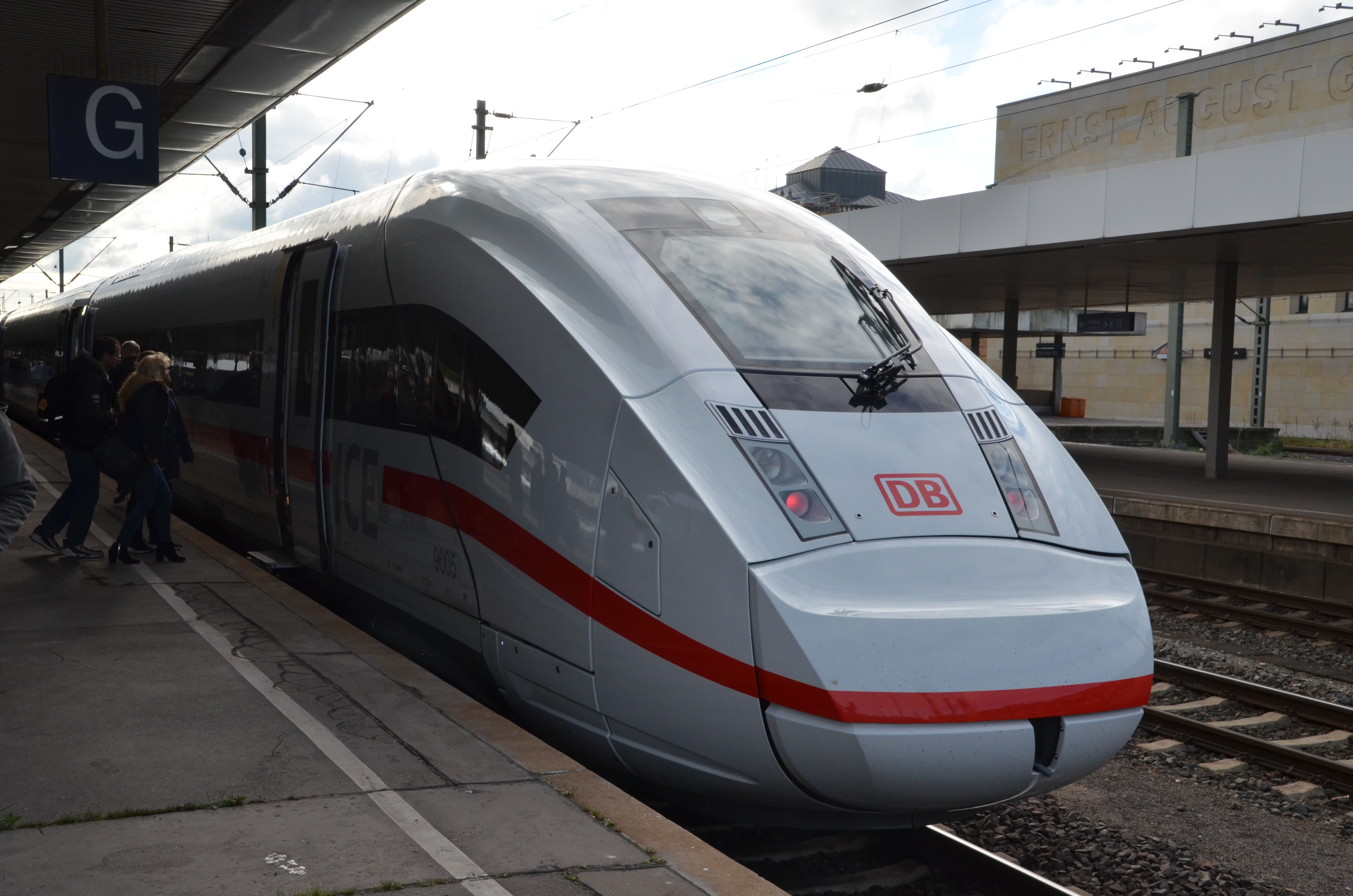 ICE 4 Probefahrt